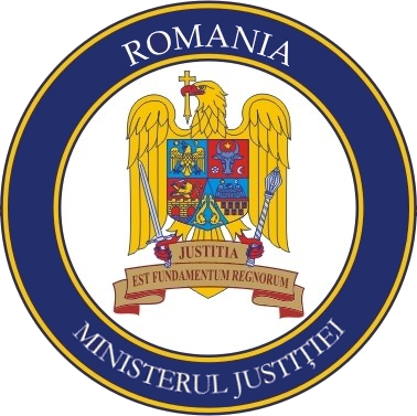 Stema Ministerul Justiției.